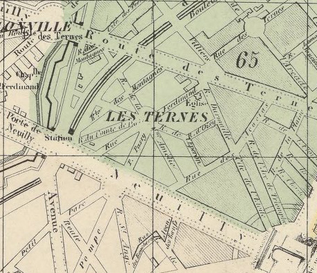 extrait place Saint-Ferdinand anciennement Ferdinanville